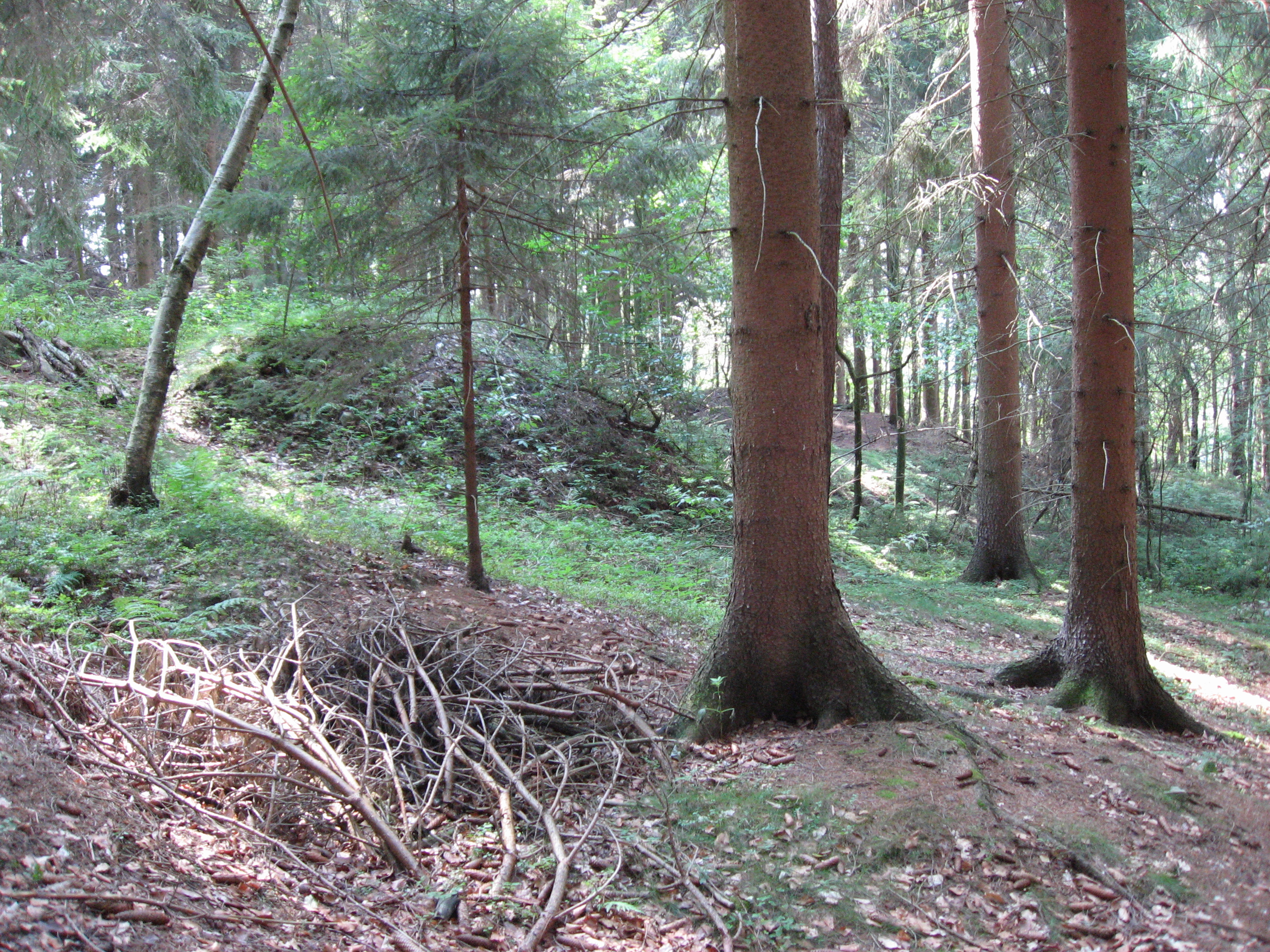 Verwachsene Halden zeugen vom Altbergbau